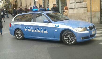 Vehiculo de la Polizia di Stato